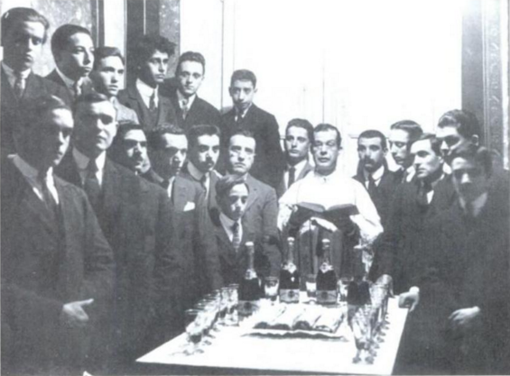 Bendición de la redaccion del semanario Joventut per la Fe i per la Pàtria (1919)